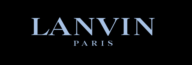 Lanvin corporate logo